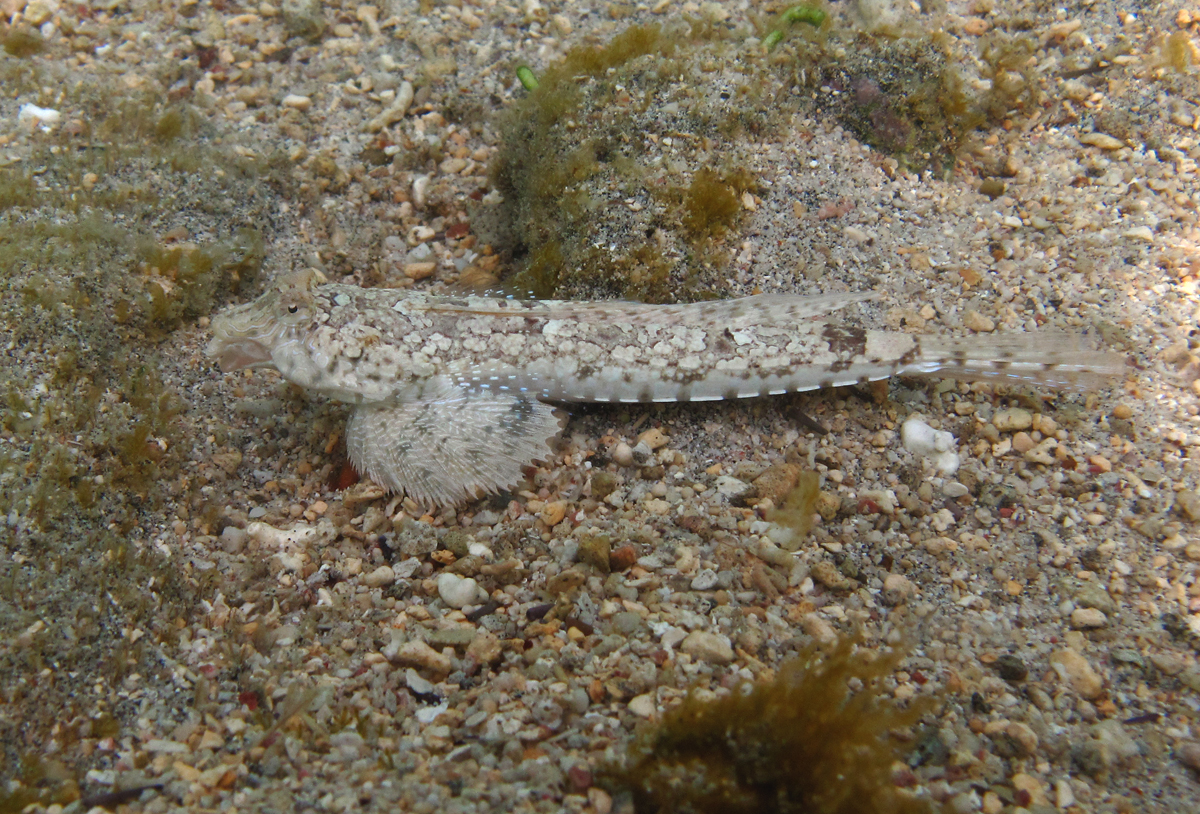 Diplogrammus infulatus à la Réunion.